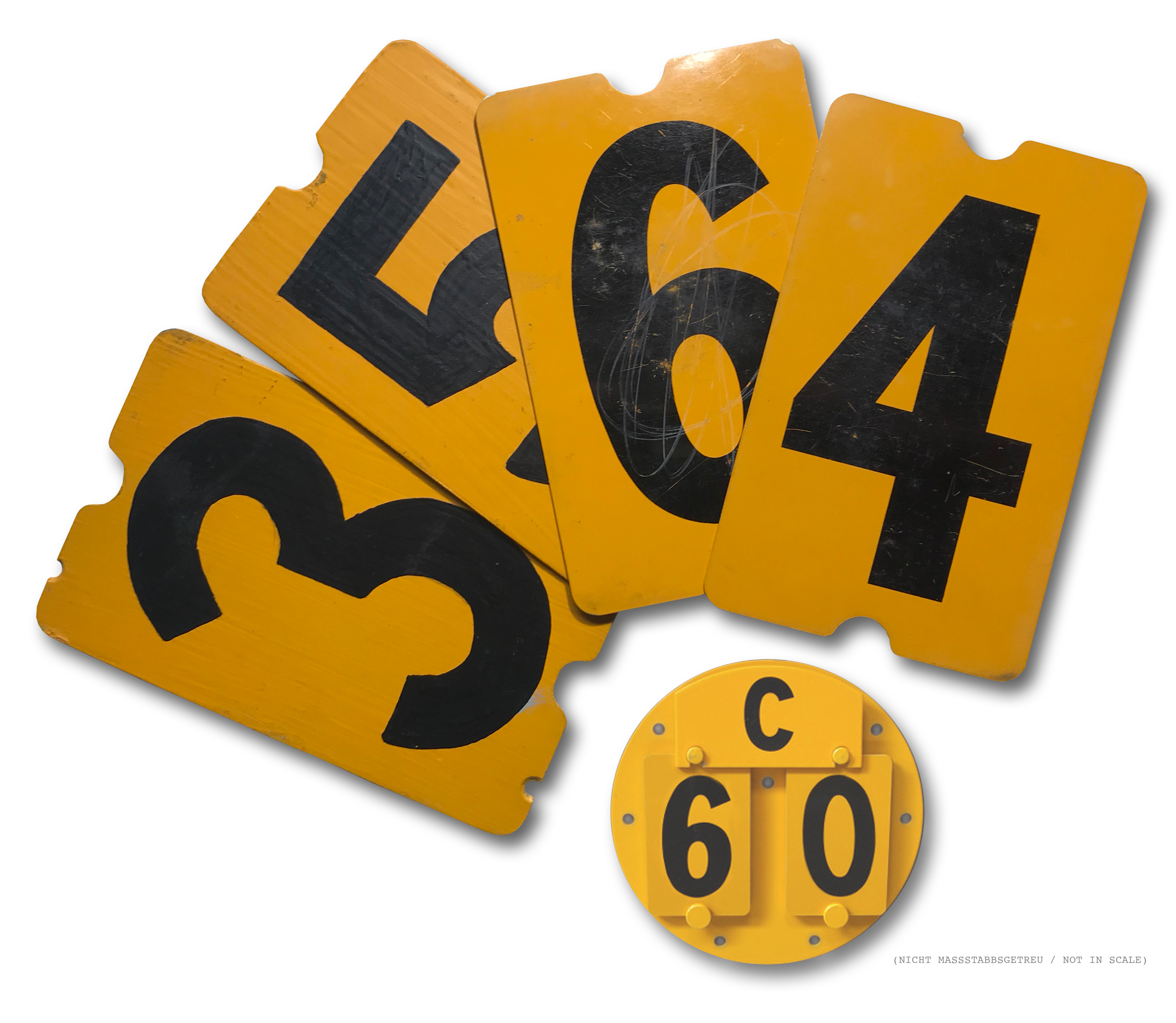 Schildersatz und Befestigungstafel für Fahrzeuge mit variabler MLC (Bundeswehr 1983/84) Da diese Tafeln bei sog. ”Ausscheidern“ (Soldaten mit weniger als 10 Resttagen) sehr beliebt waren um ihre “Lage” zu dokumentieren, mußten die (normalerweise im Siebdruck hergestellten) Schilder, in den Einheiten teilweise von Hand nachgemalt werden (siehe Schild „3“ und “5”).